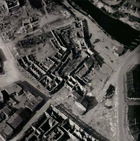 Беларуская (тарашкевіца): Менск (Miensk), Нізкі Рынак (Nizki Rynak). Аэрафотаздымак